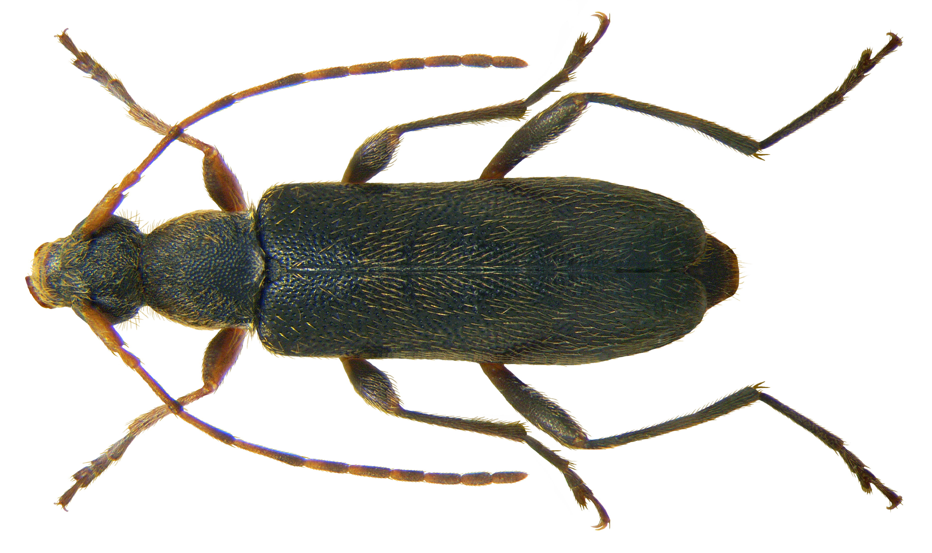 Familie: Cerambycidae Groesse: 4,5-7 mm Verbreitung: Europa Ökologie: Entwicklung in Laubholz Fundort: Germania, Bayern, Oberfranken, Neuenreuth leg.det. U.Schmidt, 1975 Foto: U.Schmidt, 2009